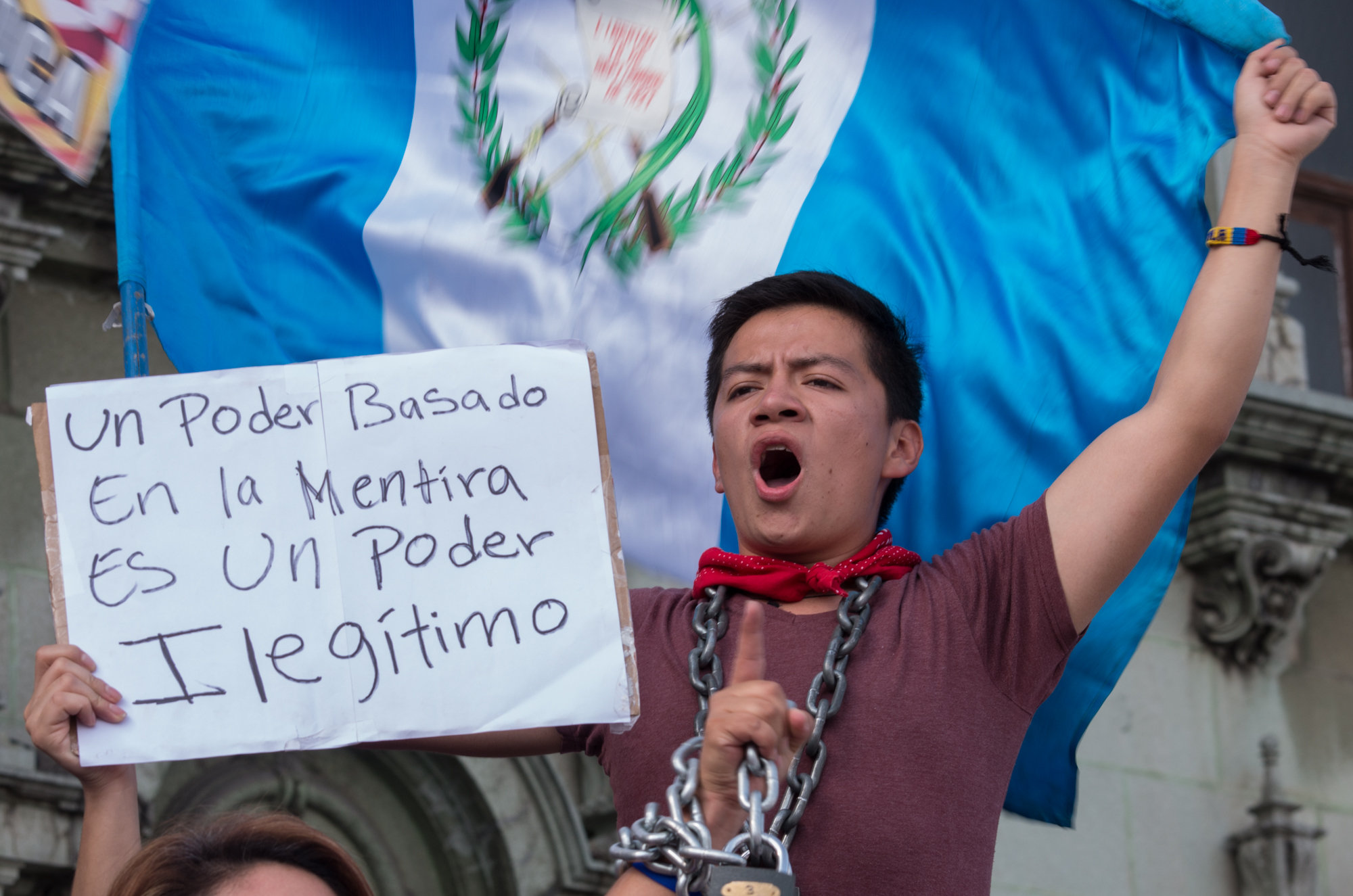 Manifestation citoyenne au Guatemala contre la corruption et pour demander la démission du gouvernement.